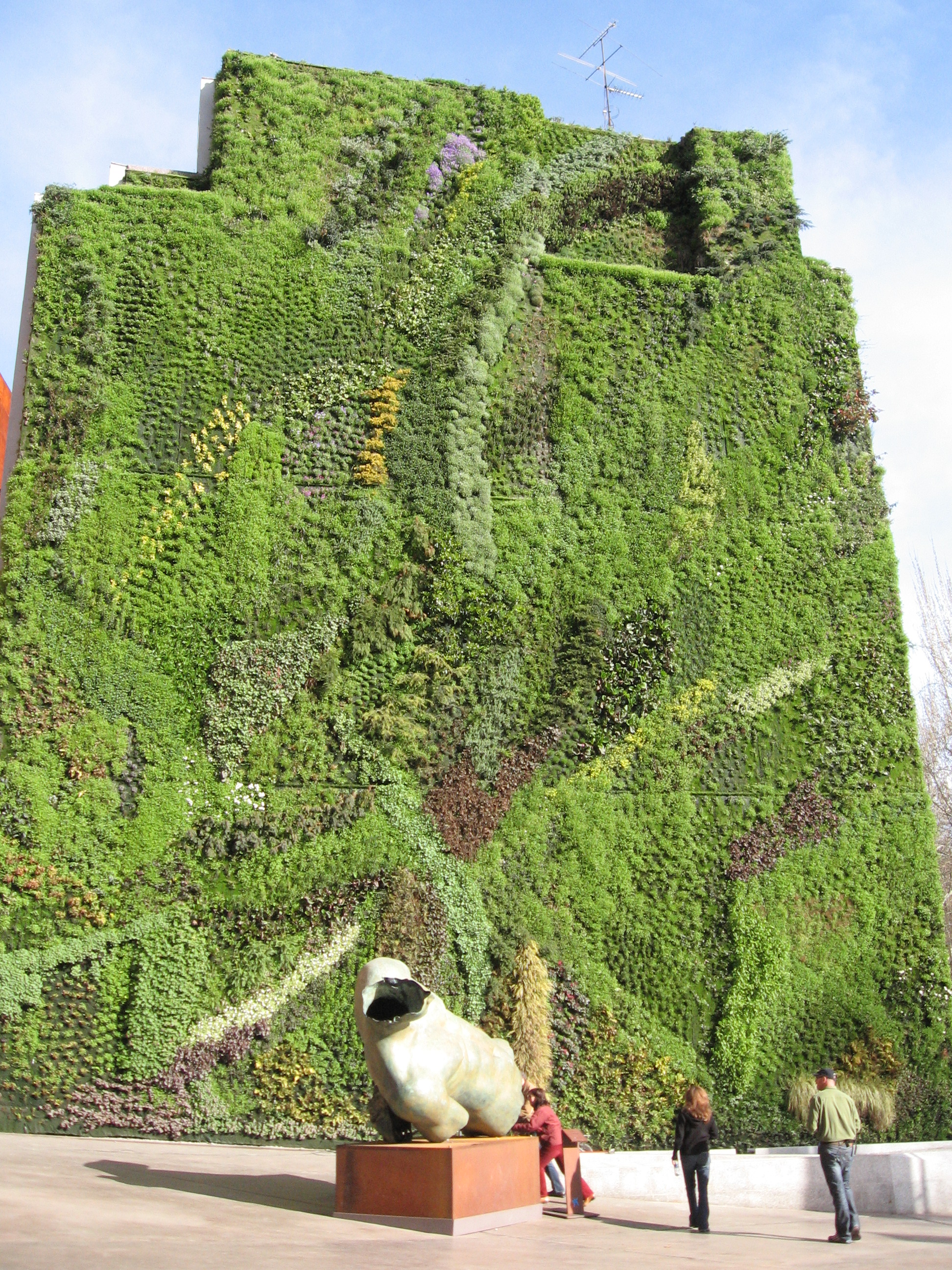 Plaza de entrada a CaixaForum Madrid en el Pº del Prado 36, Madrid. Jardín vertical diseñado por Patrick Blanc. Escultura de Igor Mitoraj.